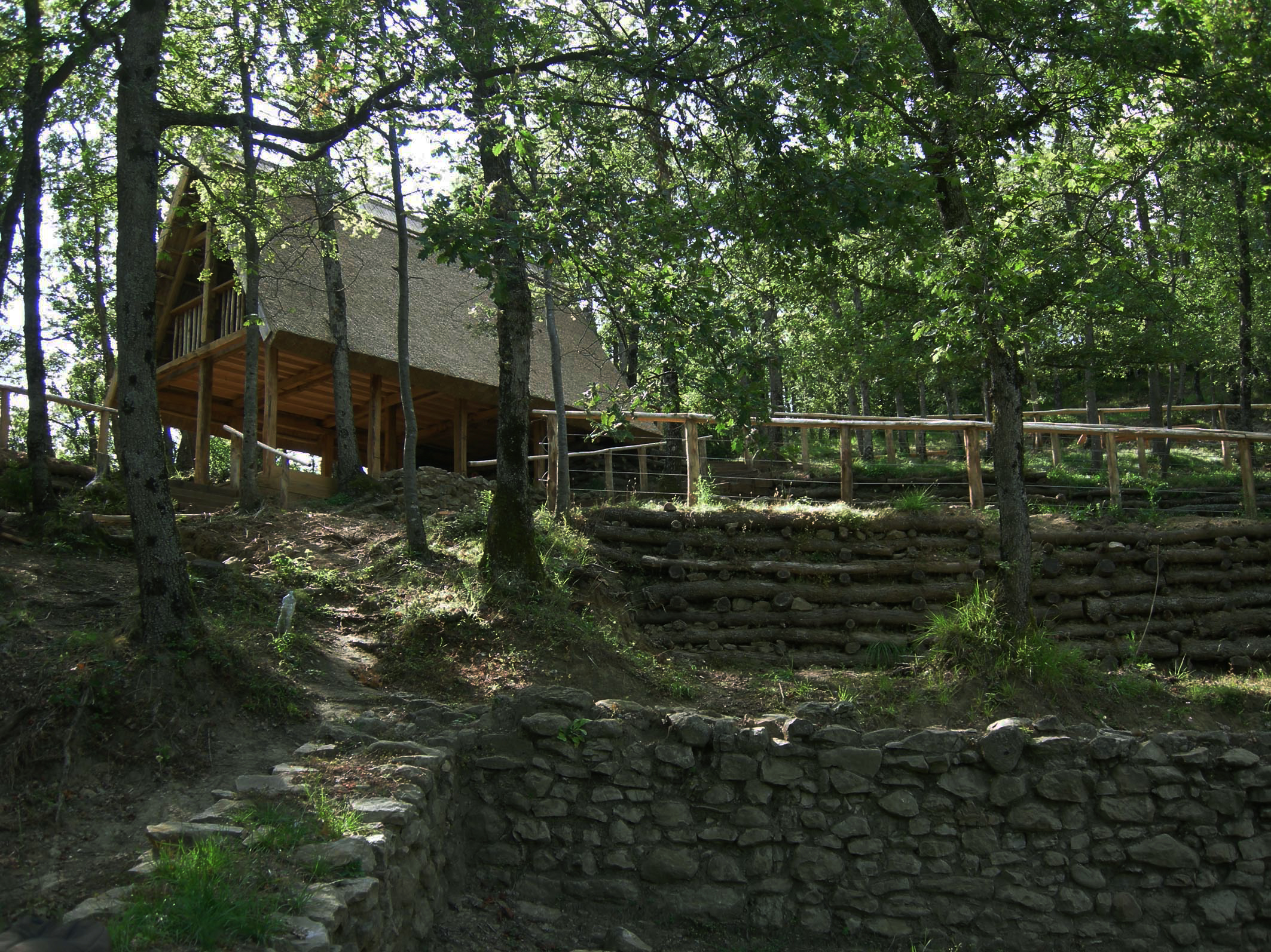 Casa 2 ricostruita nell'area archeologica di Monte Bibele.